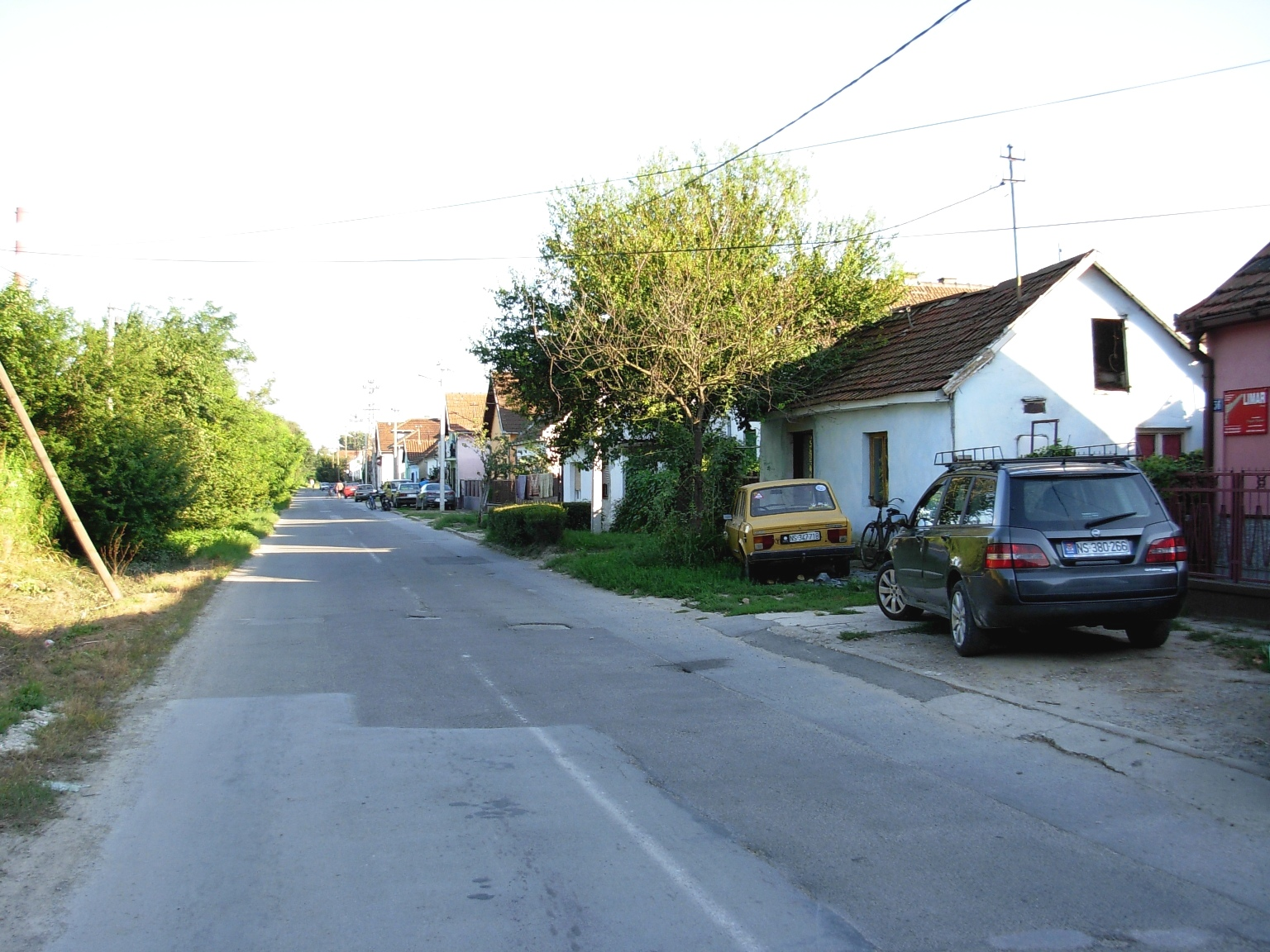 VII ulica u naselju Šangaj, Novi Sad.